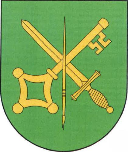 znak , Žlunice, okres Jičín